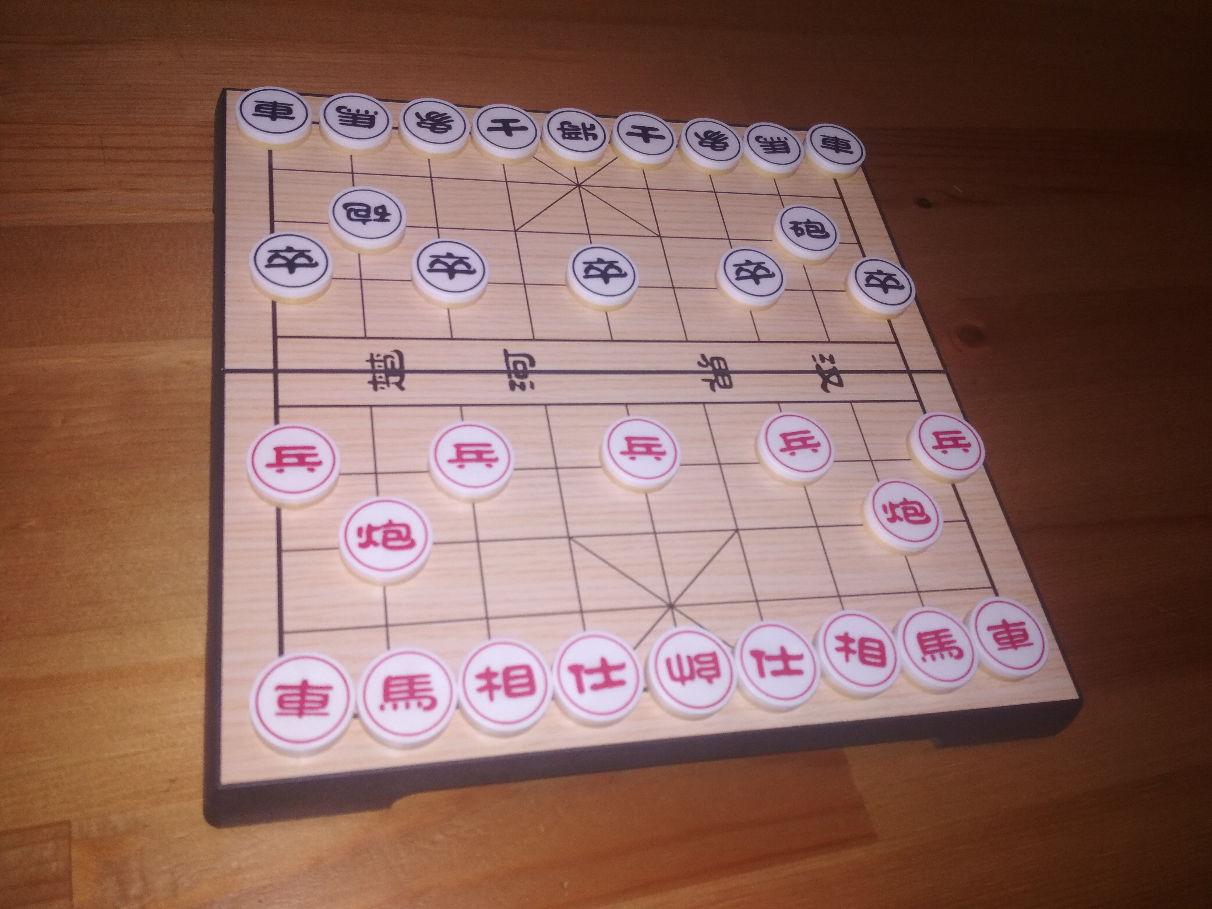 Esto es un tablero de xiangqi para jugar al xiangqi y al banqi.